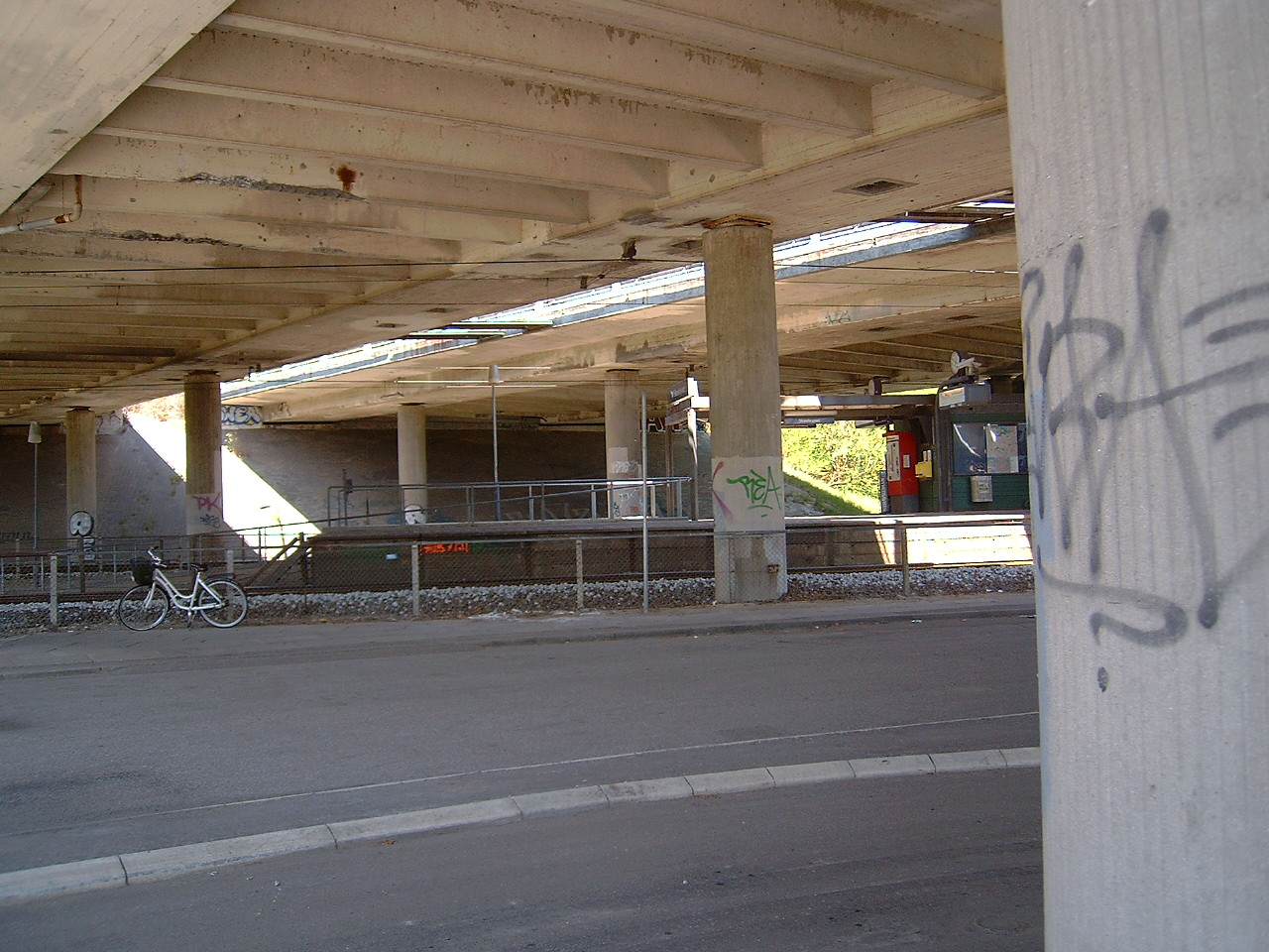 Station set fra den nærliggnde p-plads